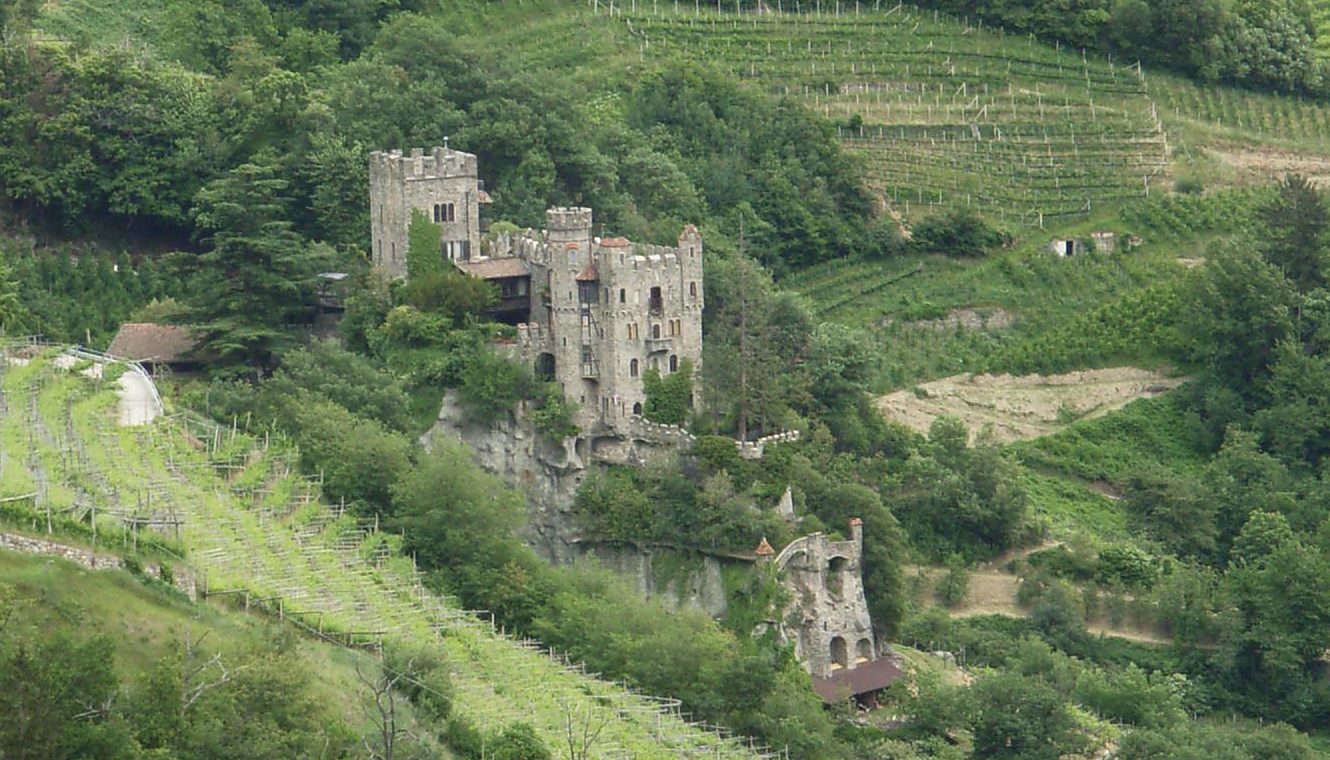 Brunnenburg in Dorf Tirol